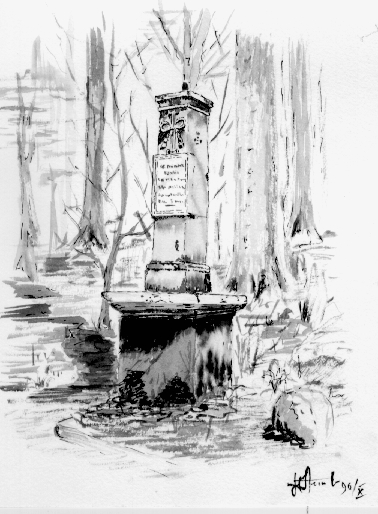 Croix commémorative en grès blanchâtre - route forestière allant vers le lieu dit la chapelle du Bon Dieu, rive gauche du ruisseau du Charmois. Raon-l'Étape 88372